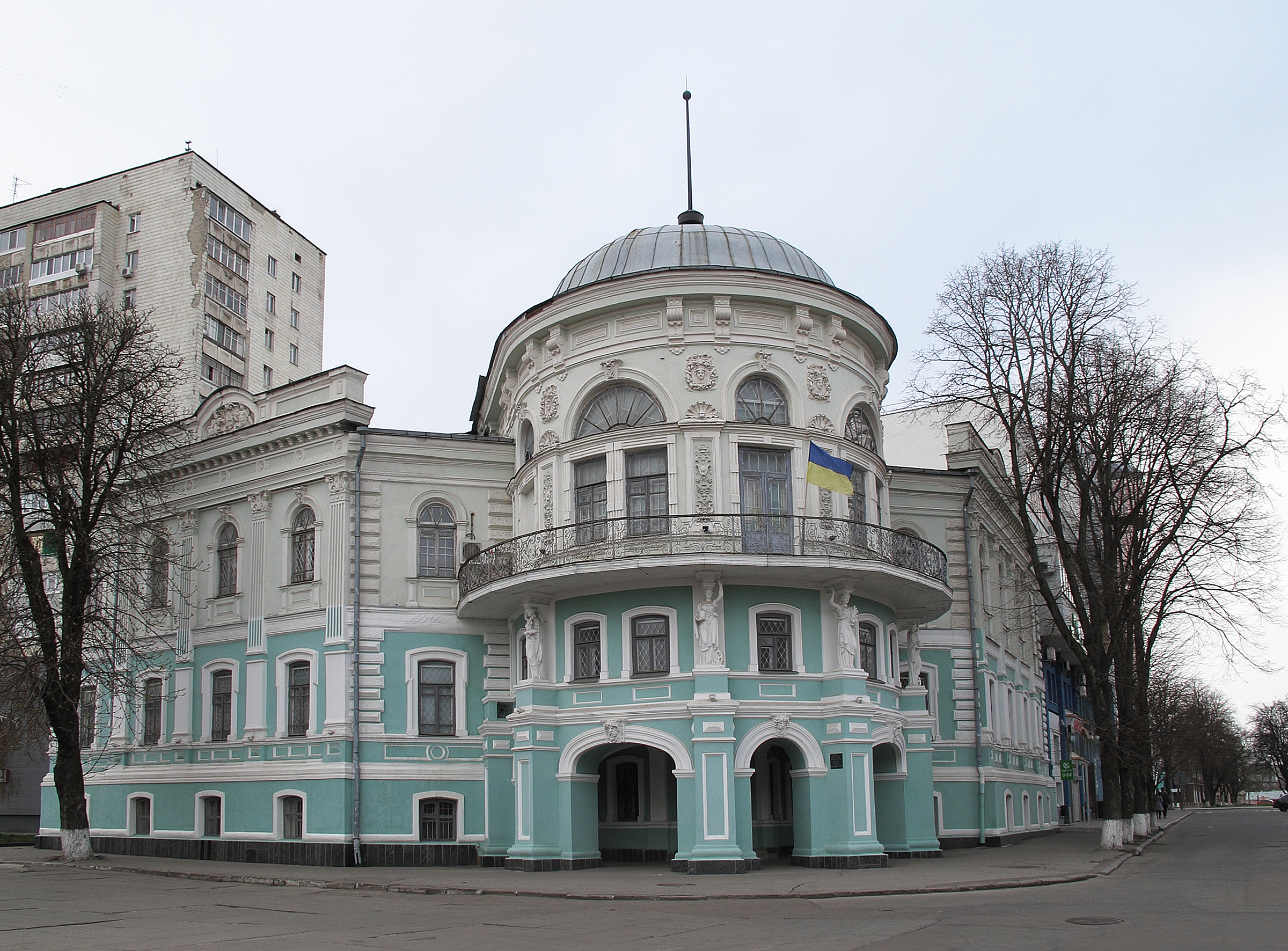 Могила почесного громадянина, мецената Д.І. Суханова, Суми, вул. 20 років Перемоги, Центральне кладовище